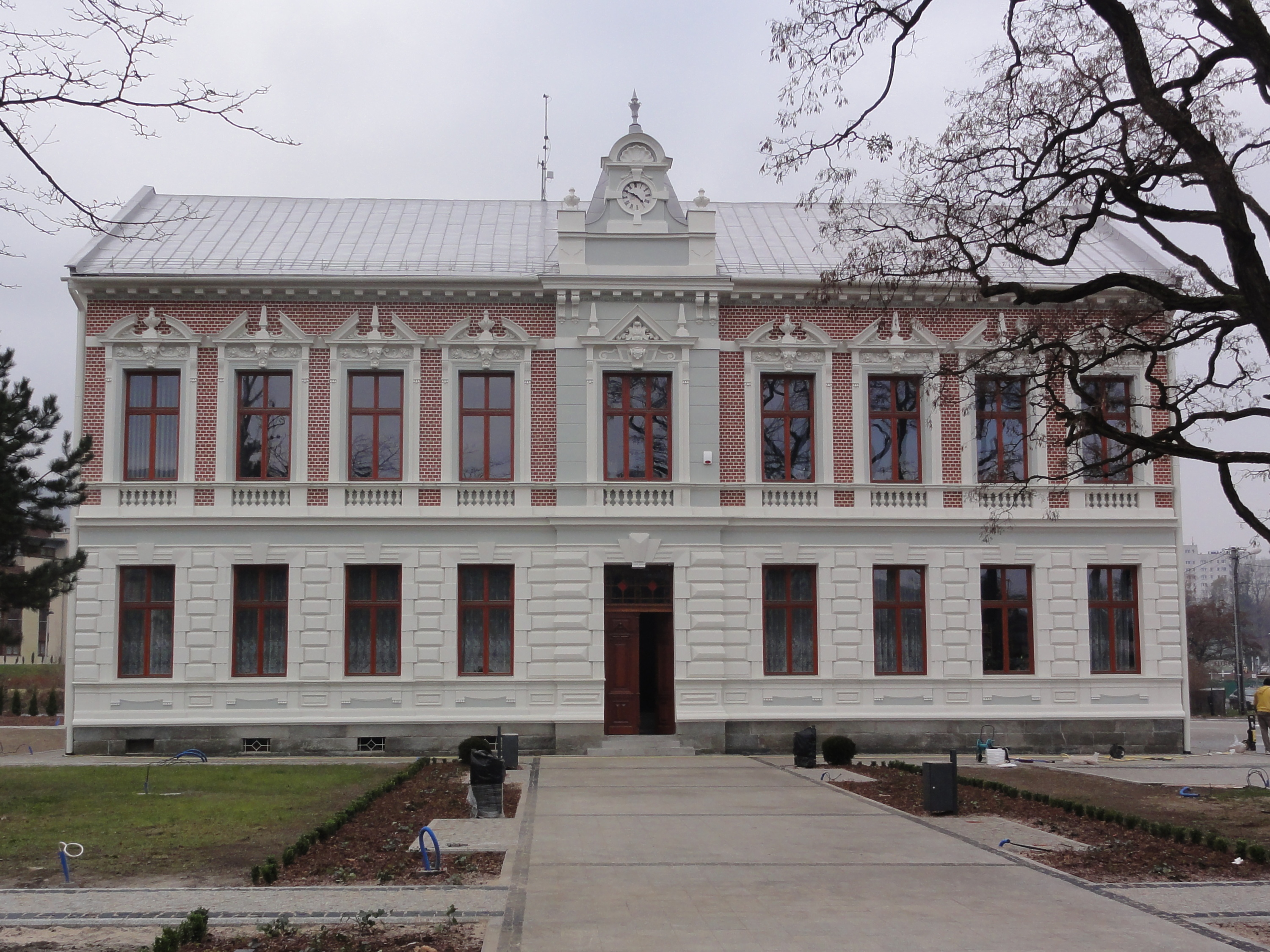 Centrum pod Jednym Dachem w Ustroniu; była szkoła parafialna